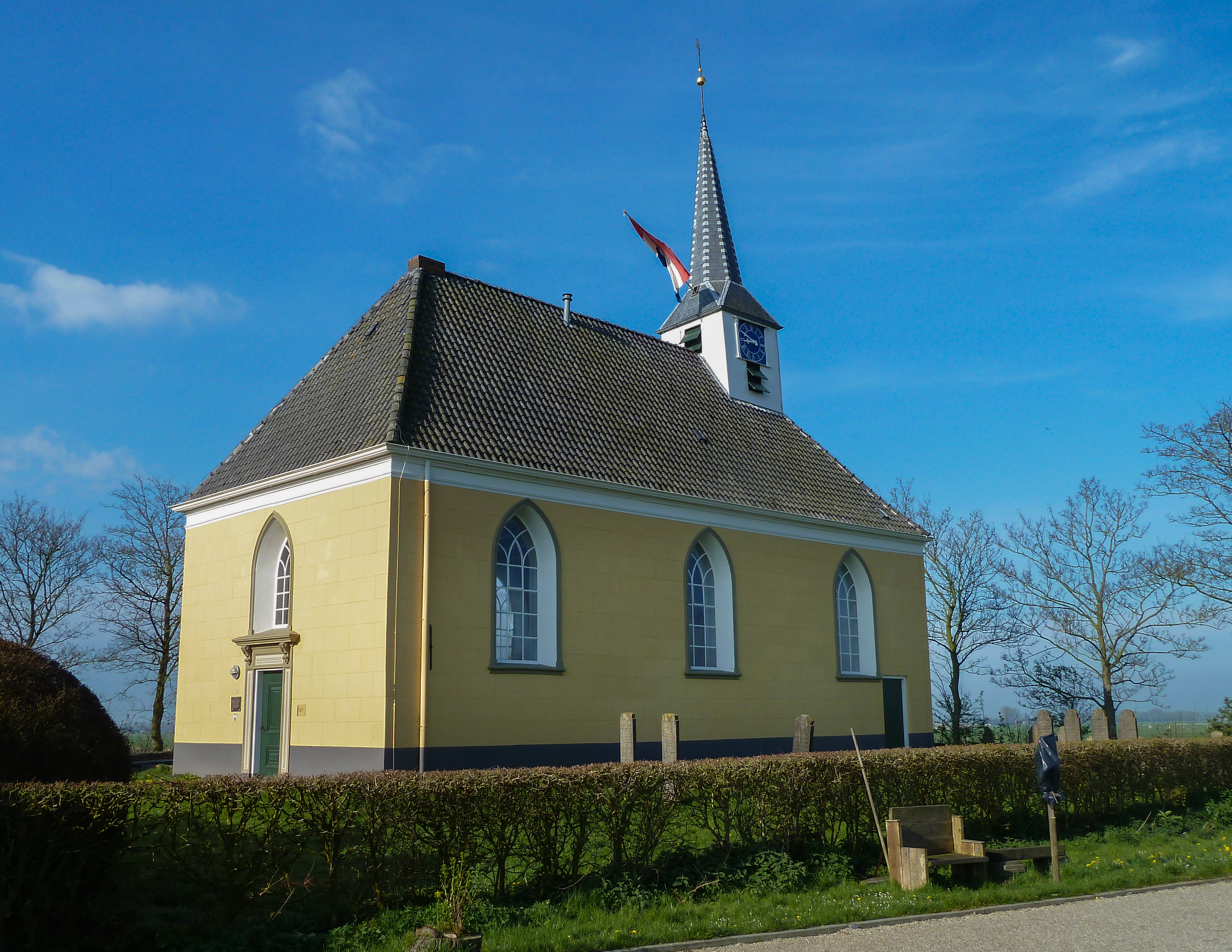 Georgiuskerk